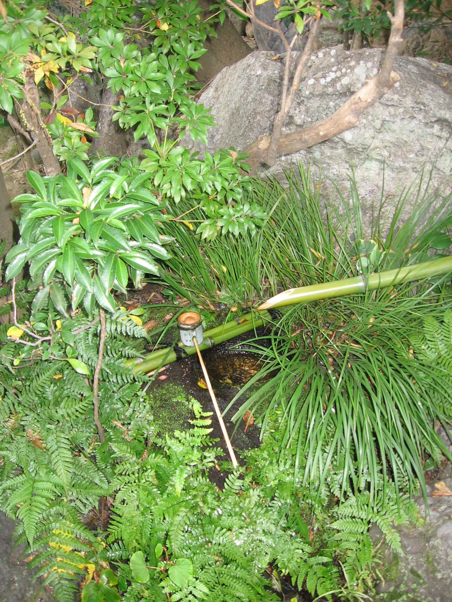 Photo de tsukubai prise dans le jardin du temple de taizo-in le 05/11/2005 par Peter 111